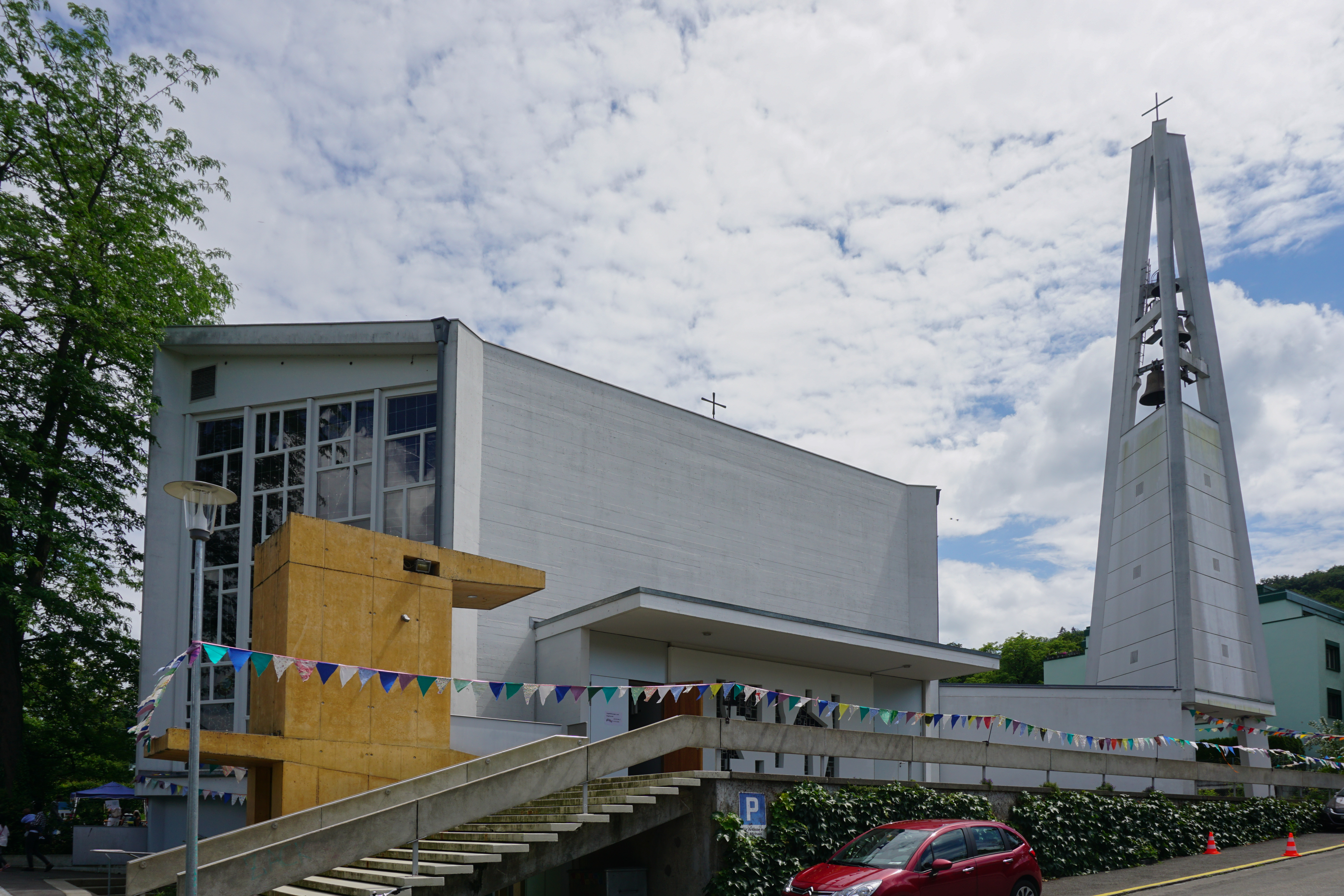 Michaelskirche Wabern, Gesamtansicht von Nord